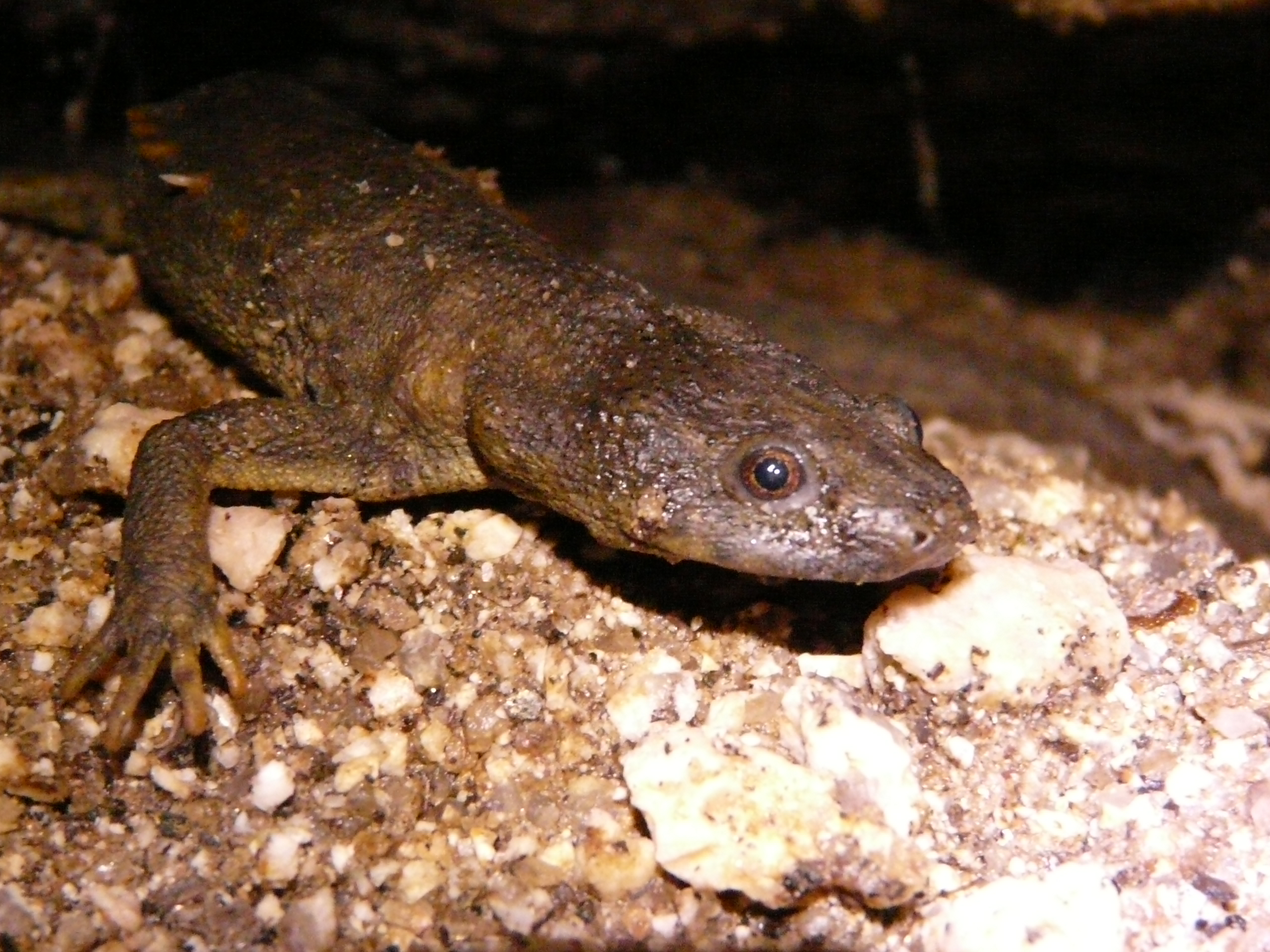 Fotografía realizada en una salida al campo (Valdemanco) .